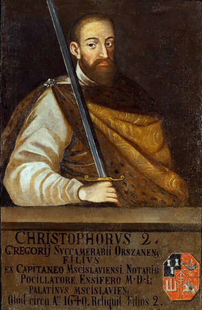 Беларуская (тарашкевіца): Партрэт Крыштапа Стэфана Сапегі (Kryštap Stefan Sapieha) гербу «Ліс» (1590—1627), дзяржаўнага дзеяча Вялікага Княства Літоўскага, маршалка Галоўнага Трыбуналу і пісара вялікага